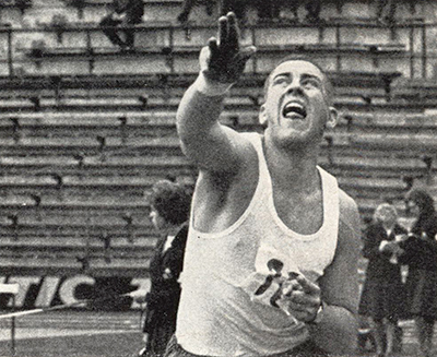 Bengt Bendéus